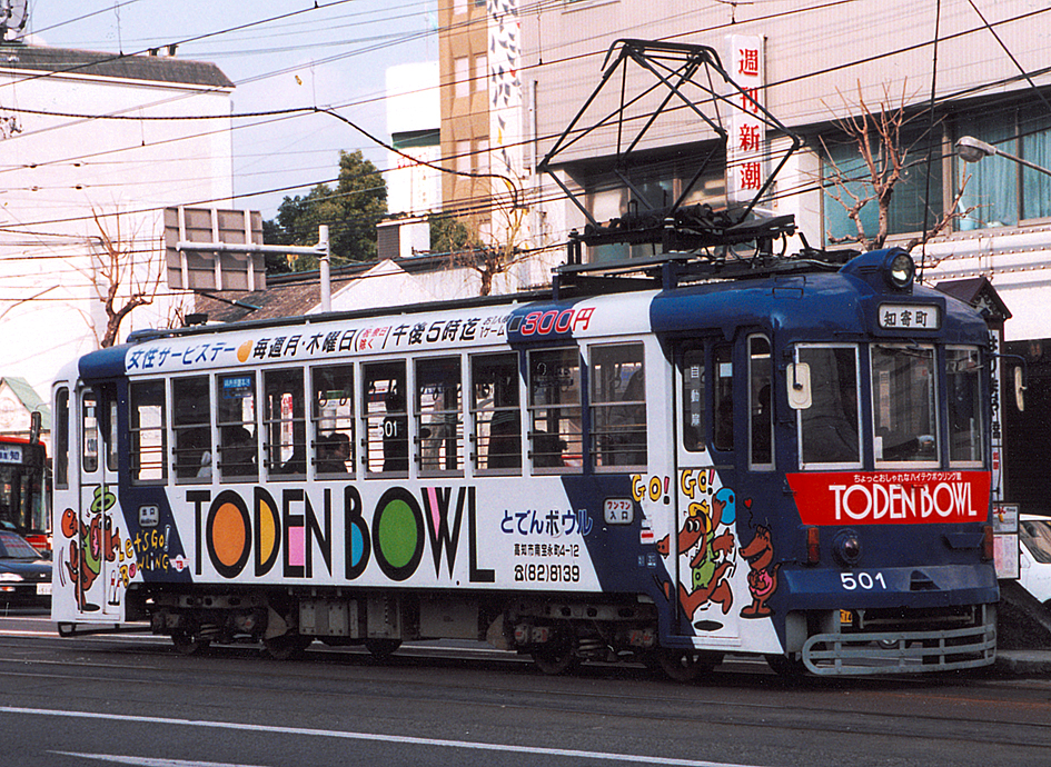 土佐電鉄 500形電車 501